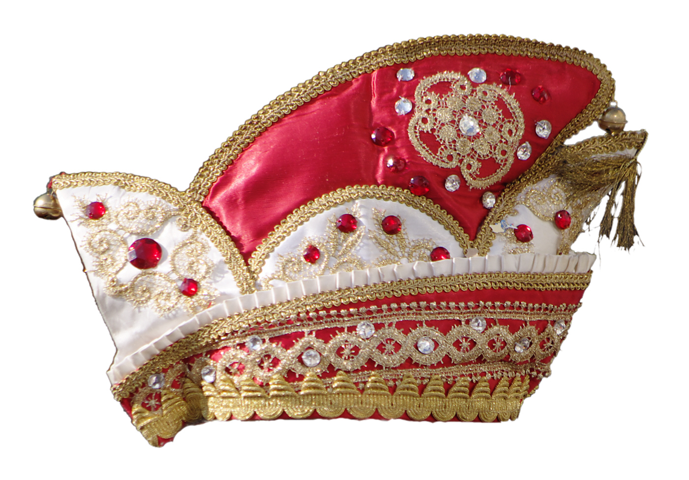 Eine Narrenkappe